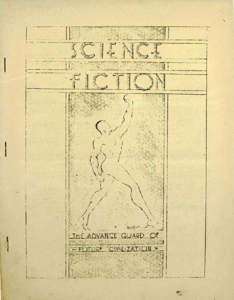 Capa da terceira edição do fanzine Science Fiction no. 3, arte Joe Shuster, 1933